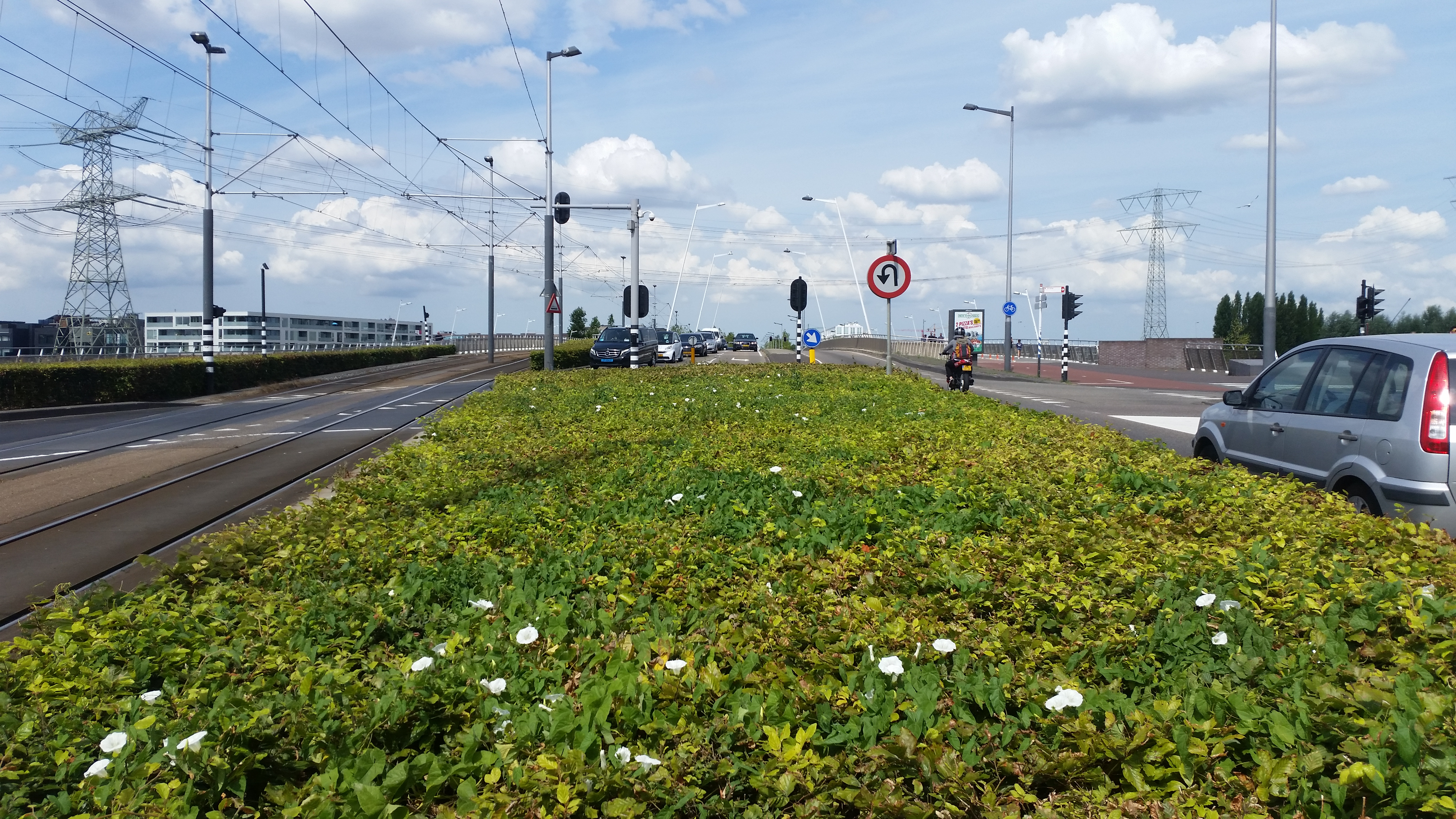 Brug 2002 (in Amsterdam); overzicht vanaf IJburg